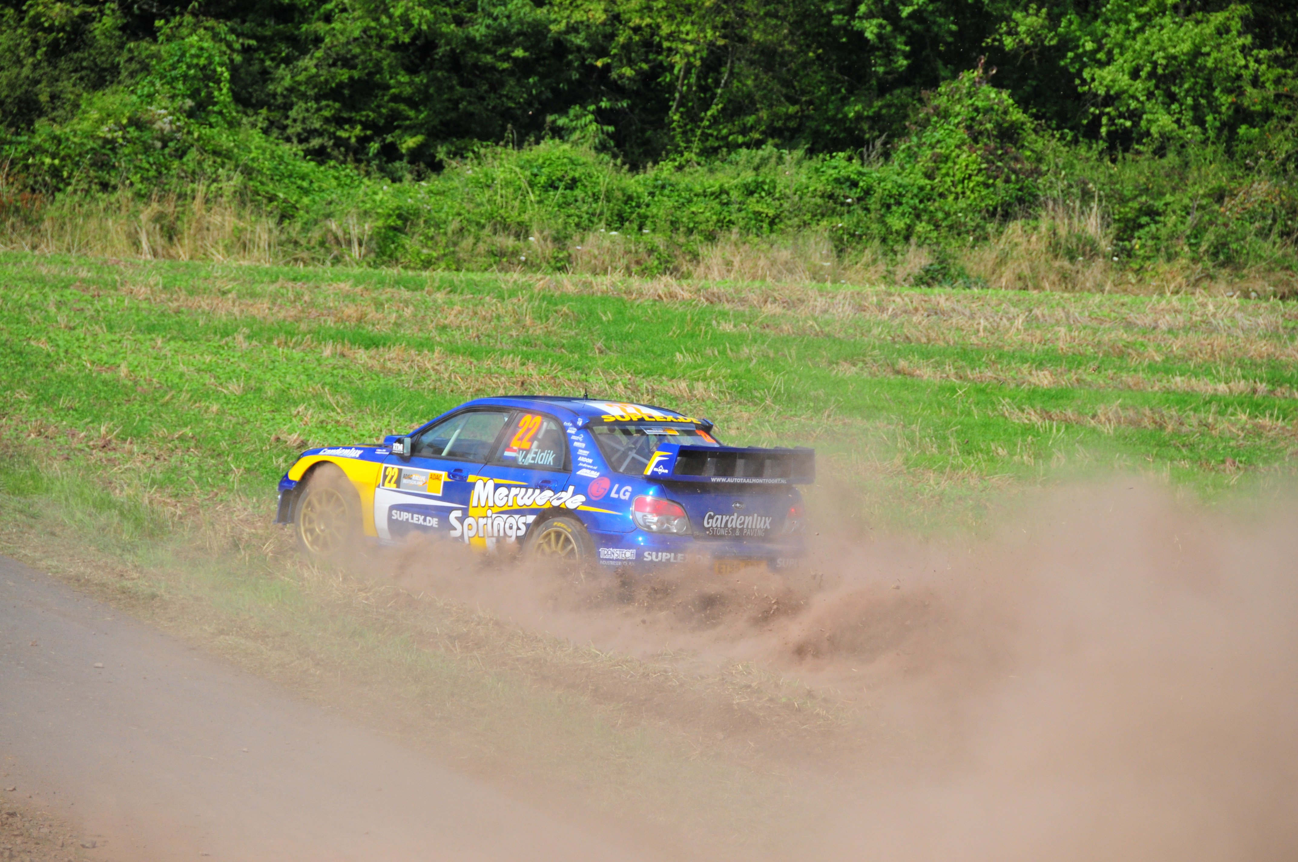 Mark van Eldik driving his Subaru Impreza WRC2007 at the 2008 Rallye Deutschland.